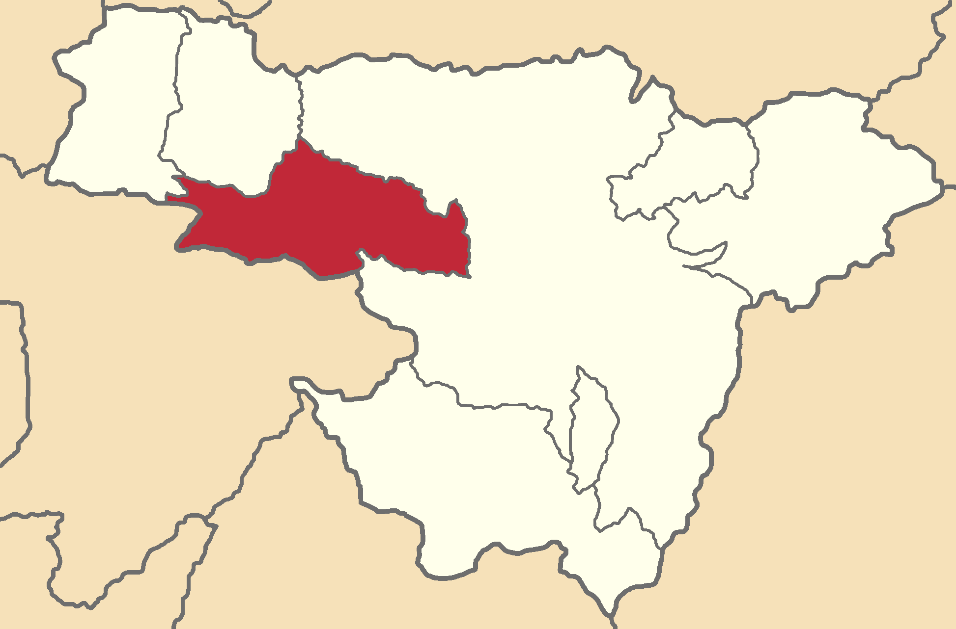 Mapa localizador del cantón en Pichincha, Ecuador